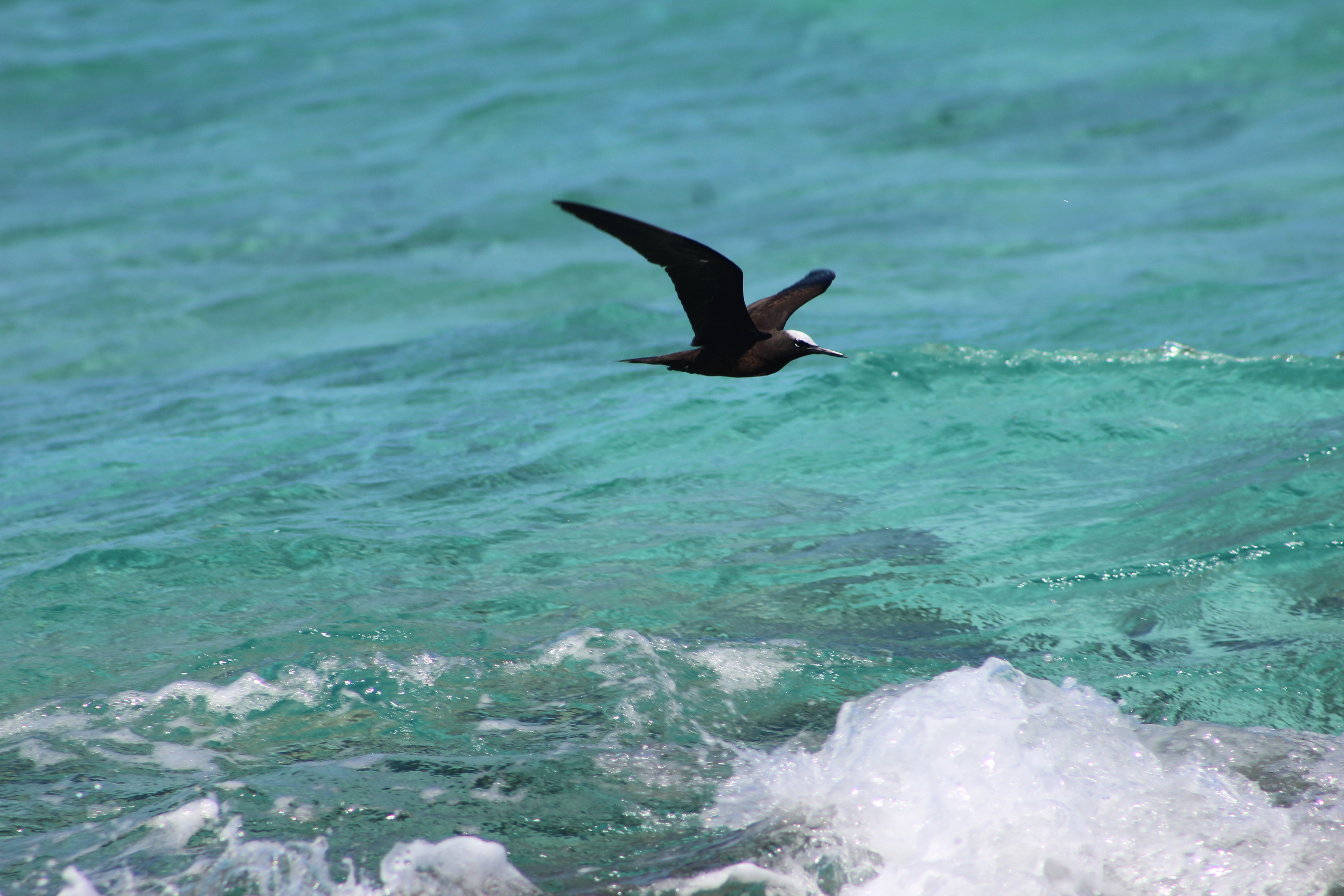 Esta fotografía fue tomada en un área protegida de Colombia con el código 652 del RUNAP. Esta fotografía fue tomada en un área protegida de Colombia con el código 11001 del RUNAP.